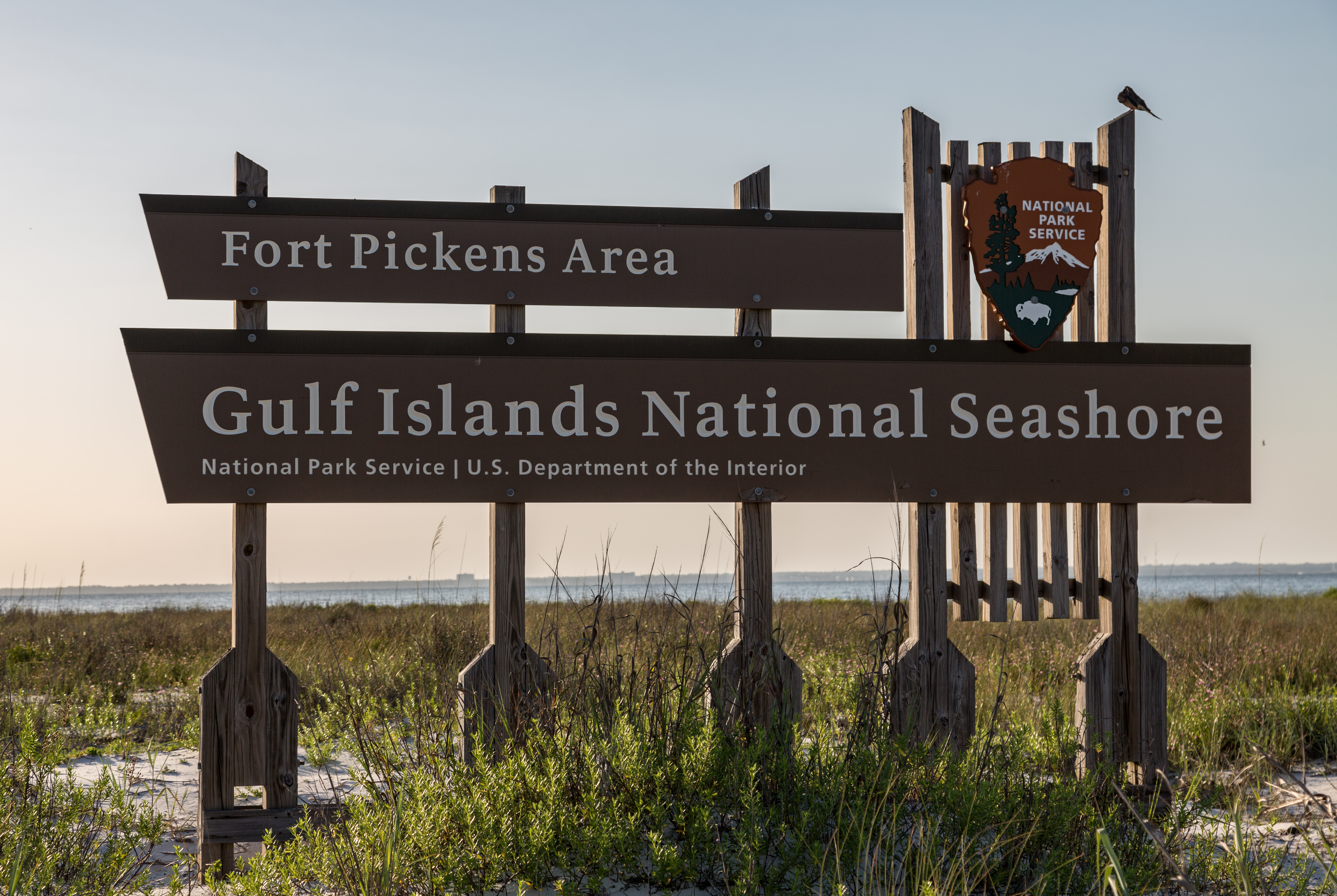 Santa Rosa Island (Pensacola Beach), Florida